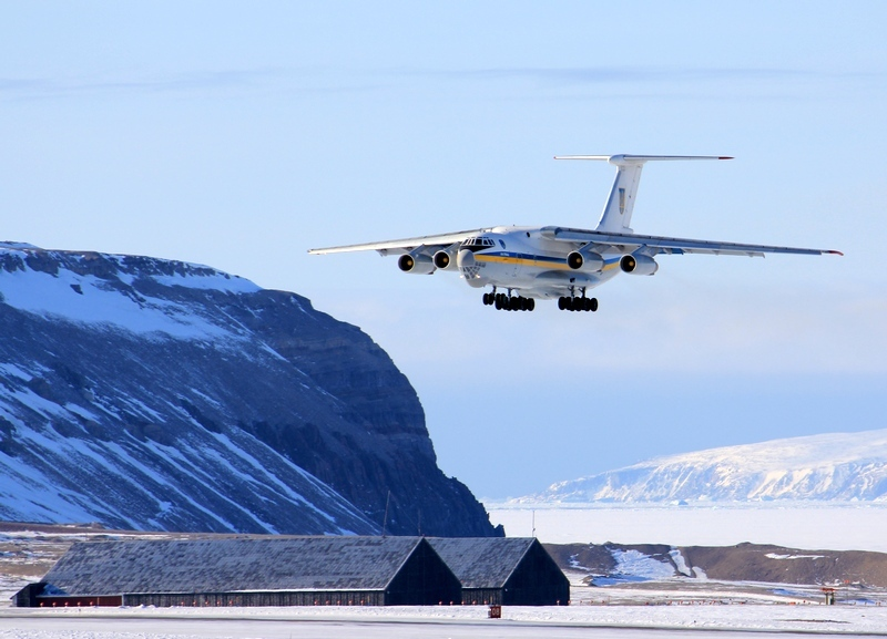 Літак Повітряних Сил ЗС України під час українсько-данської операції "Північний сокіл". Грендландія